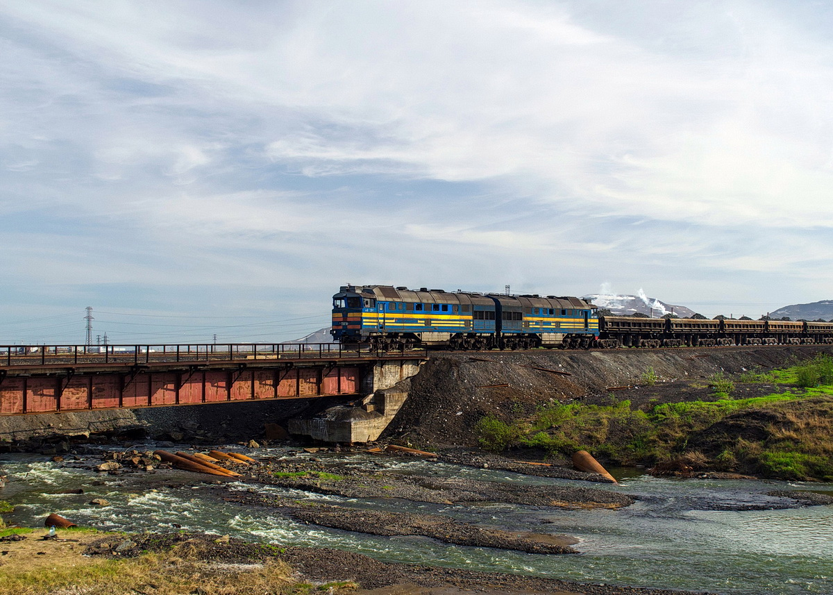 2ТЭ116